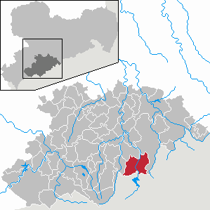 Jöhstadt im Erzgebirgskreis, Sachsen